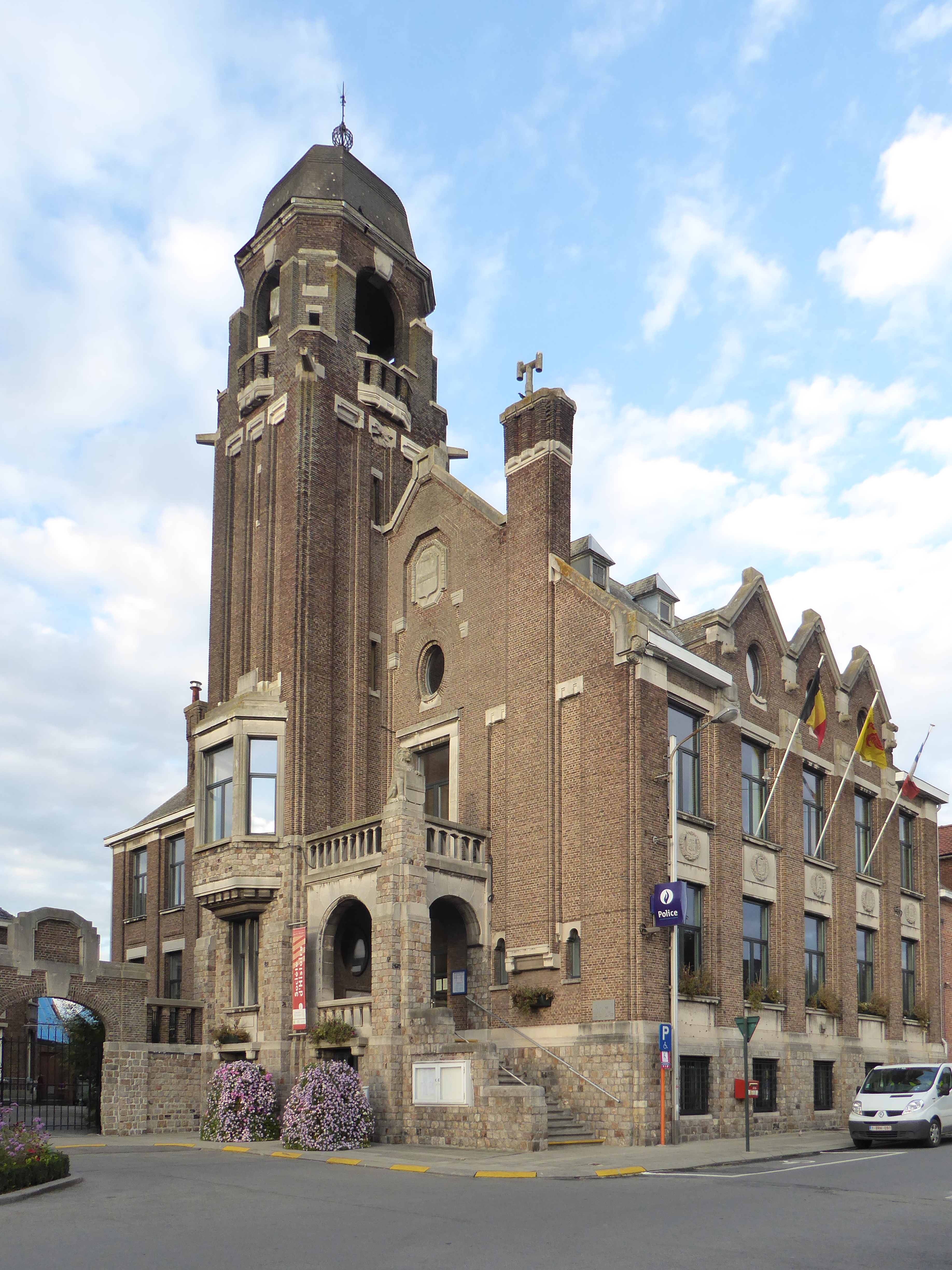 Warneton (Belgique), l’hôtel de ville (1925).